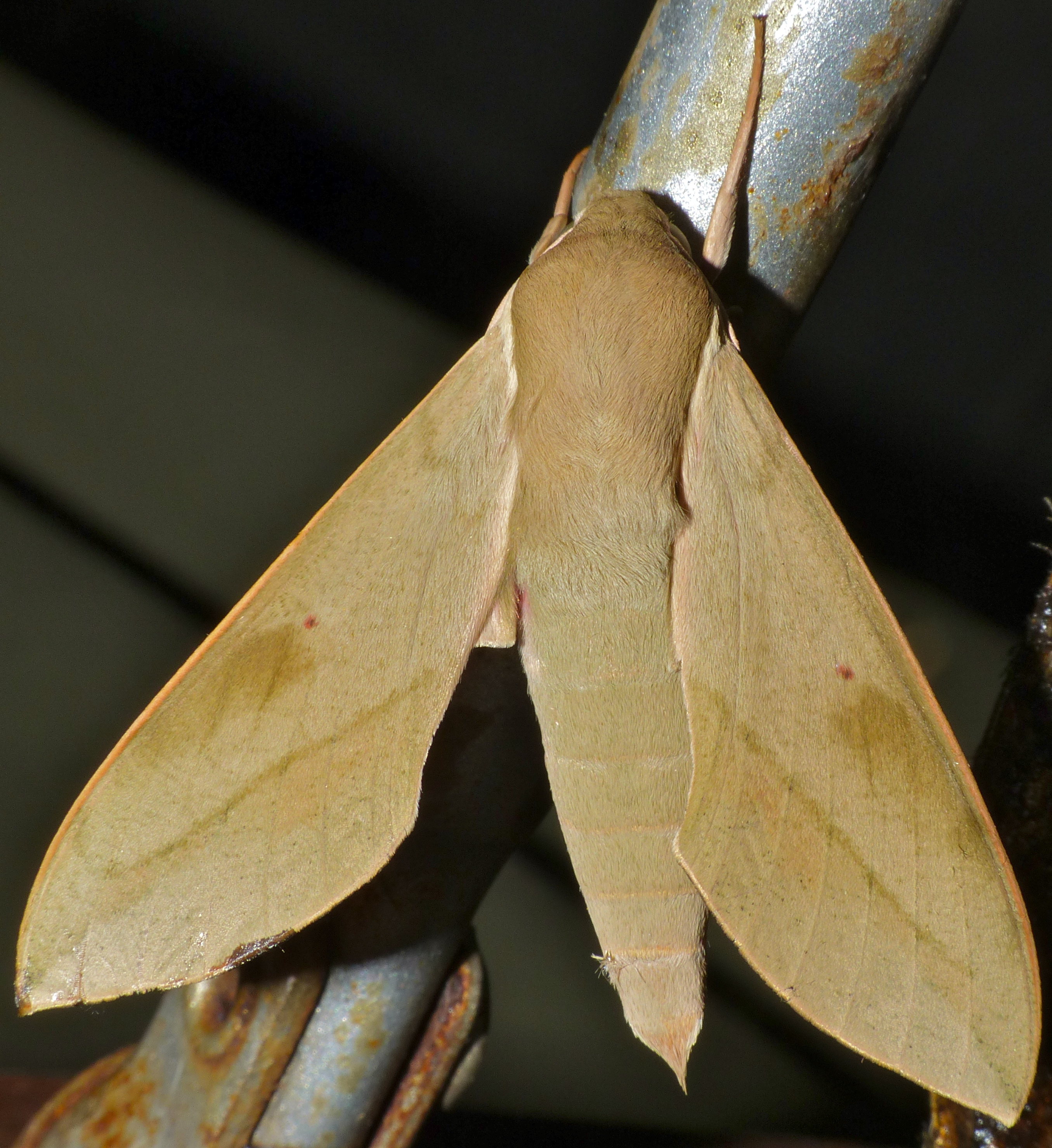 Safari Tent N°27, Tamboti Tented Camp, Kruger NP, SOUTH AFRICA